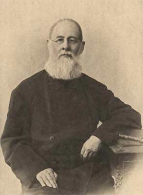 Козлов Алексей Александрович (1831-1901), русский философ и публицист.